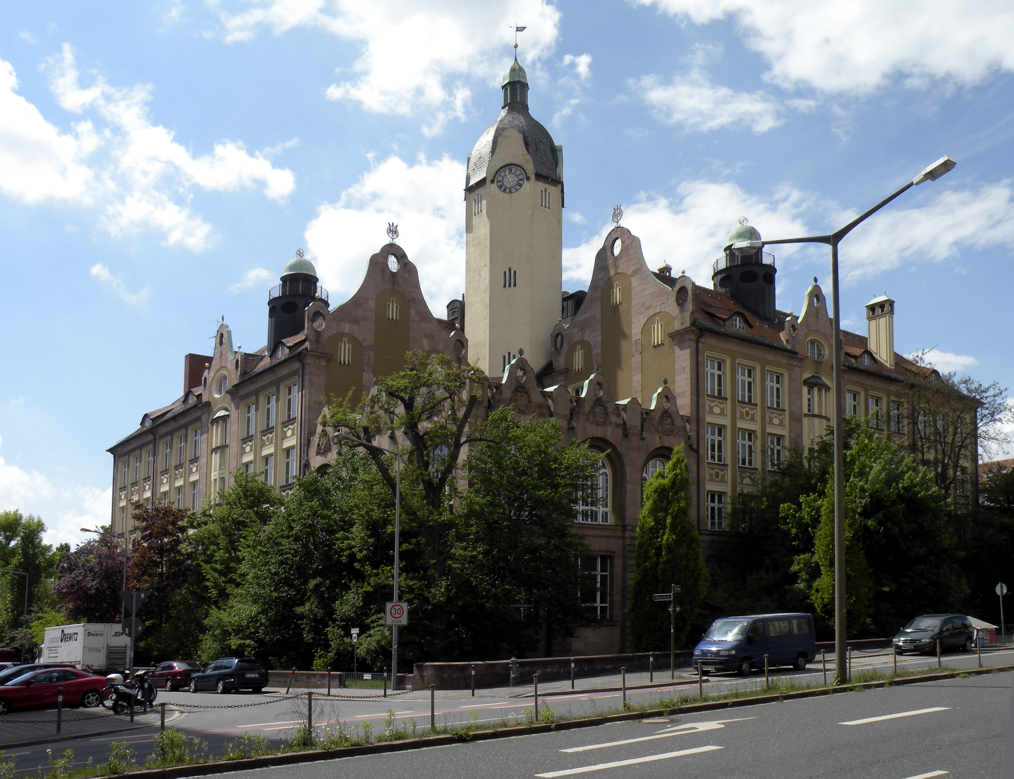 Bismarck-Schule in Nürnberg-Schoppershof